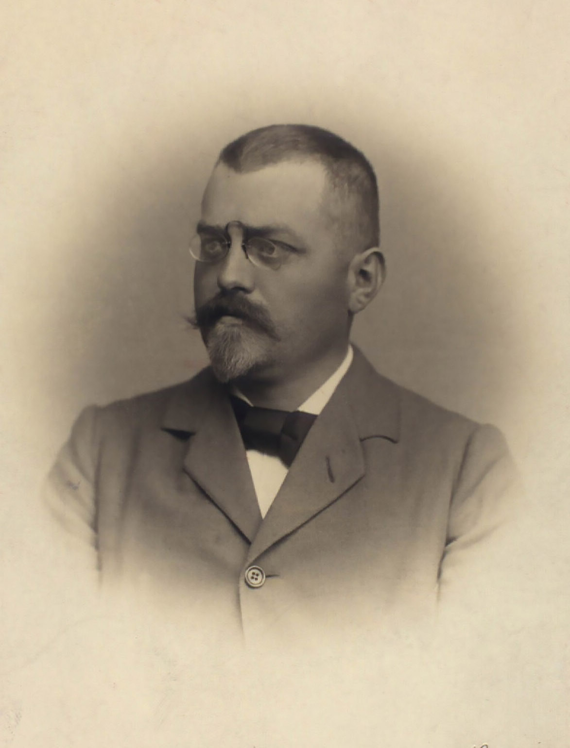 Foto af Sigurd Berg (3.jul.1868-11.jul.1921), dansk politiker og bladmand.